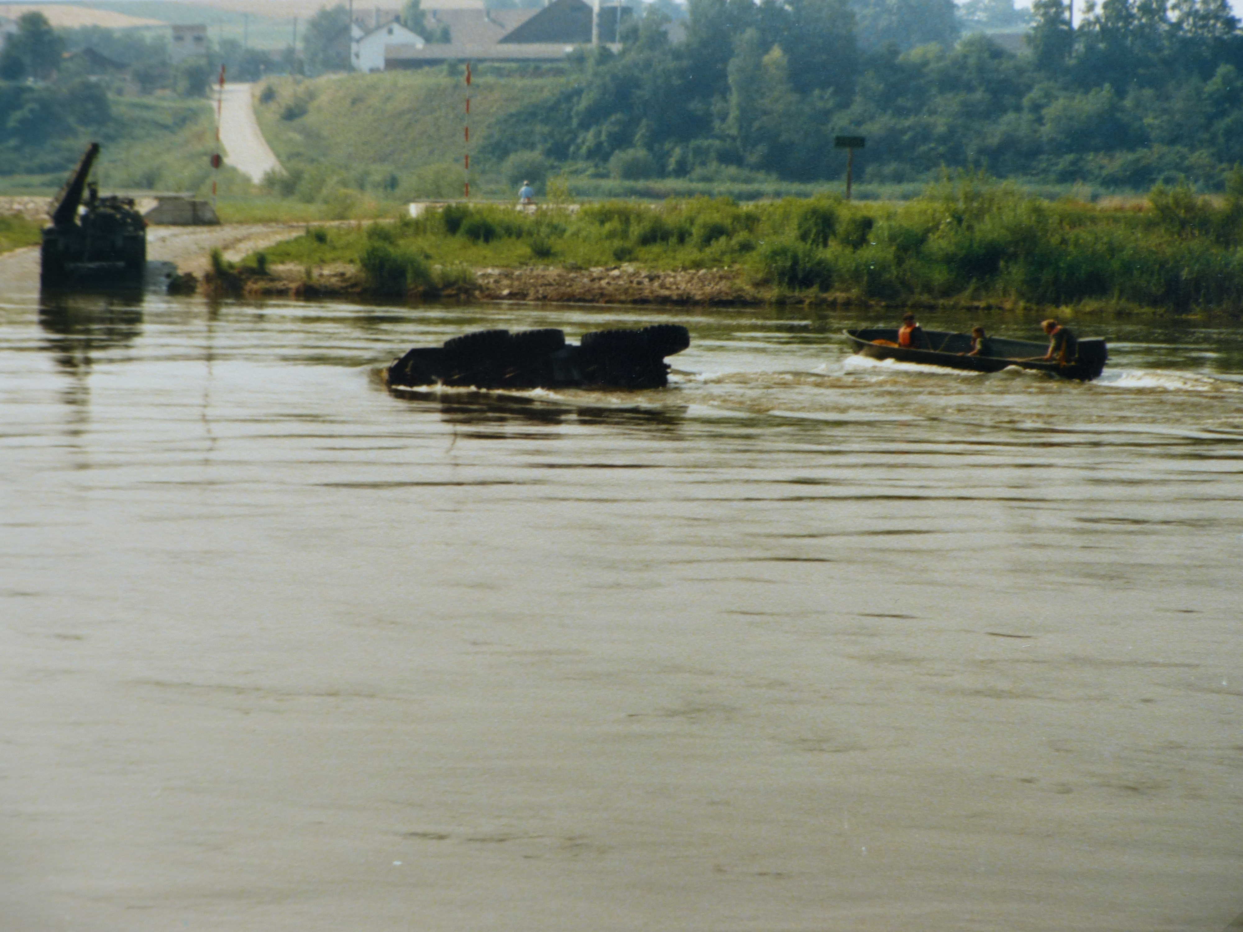 Am 18. Juli 1986 bei Eining/Donau gekippter und untergegangener Luchs